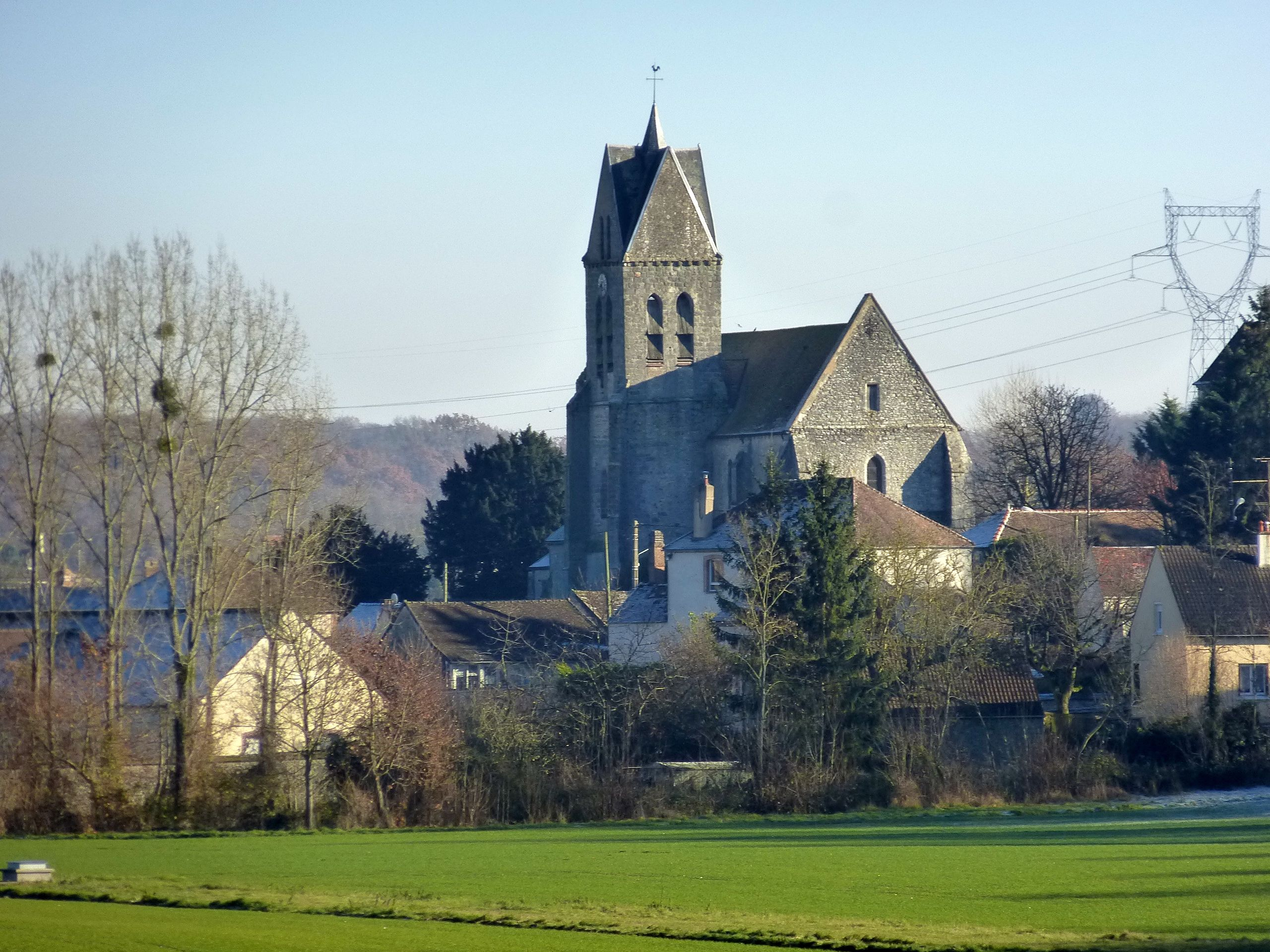 Salins et son église. (département de la Seine-et-Marne, région Île-de-France).